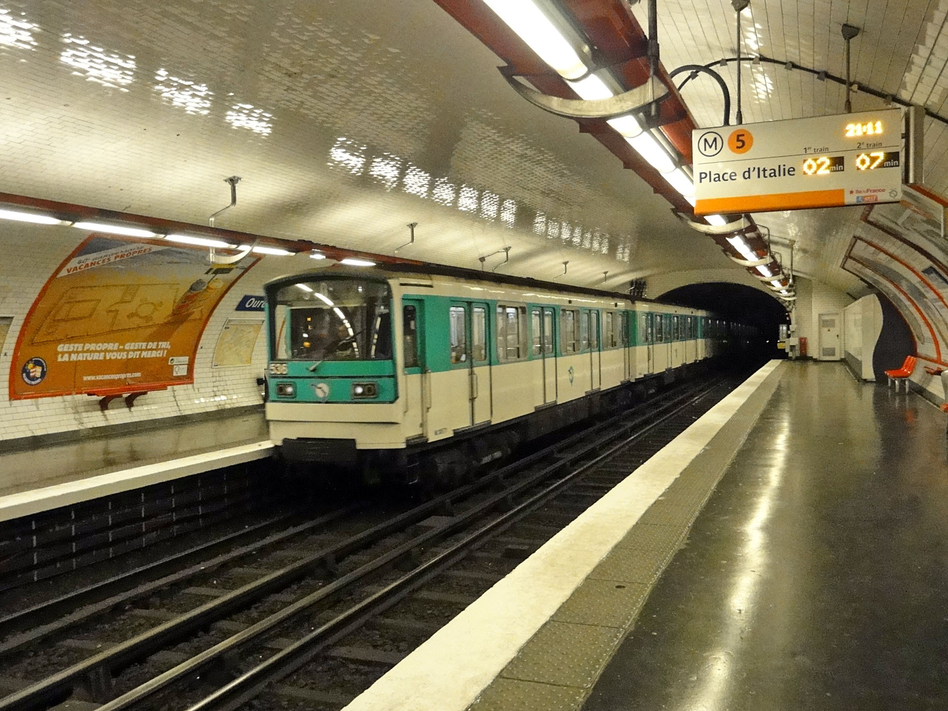 La station Ourcq de la ligne 5 du métro de Paris, France.